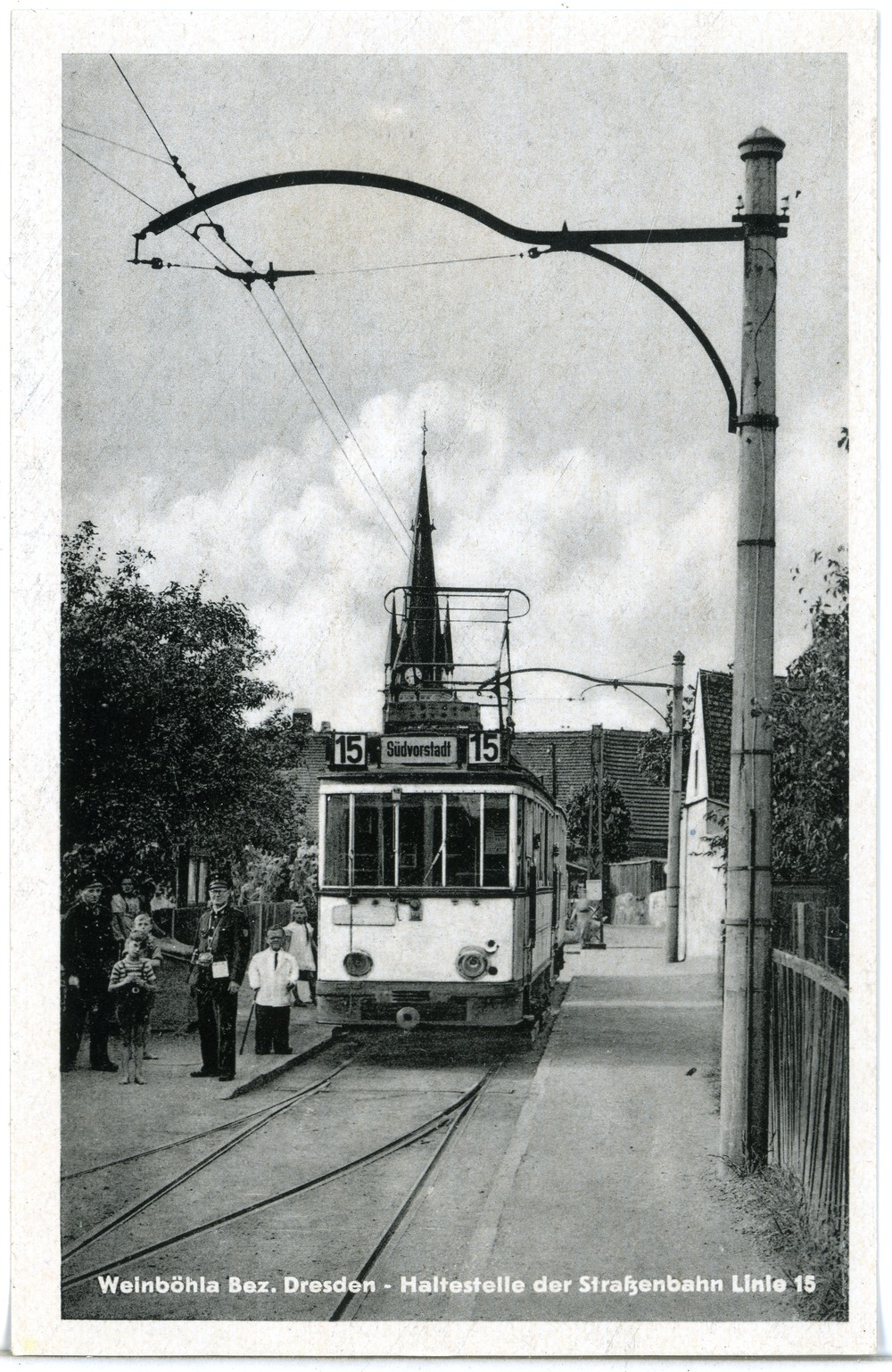 Weinböhla; Haltestelle Linie 15 mit Straßenbahn This postcard is from publisher Brück & Sohn in Meißen ( postcard has a unique number 28267 and is available in a higher resolution at the publisher. This images was uploaded in a cooperation project between Wikipedians and the publisher.